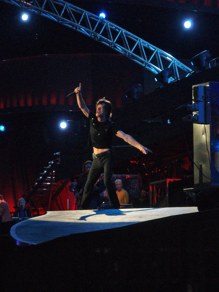 Mick Jagger. Concierto de los Rolling Stones en el estado Vicente Calderon (Madrid). 28-Junio-2007